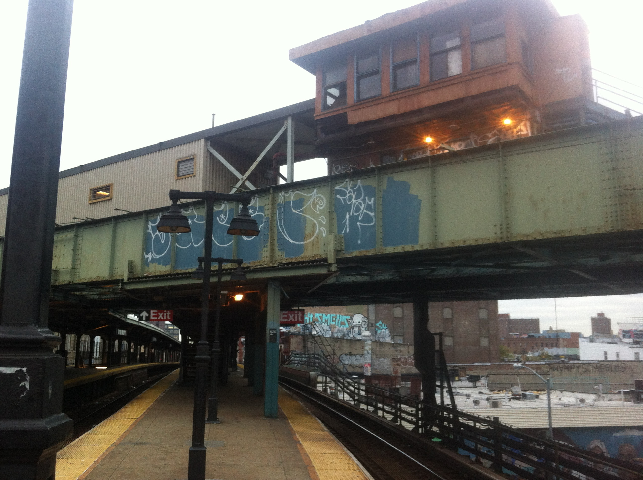 TRAINS